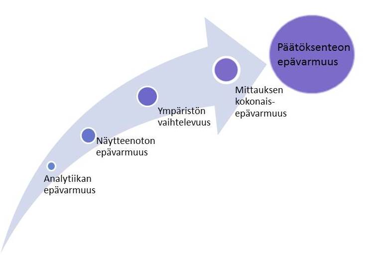 Uncertainty of sampling is a part of the total uncertainty of the environmental reserach process.